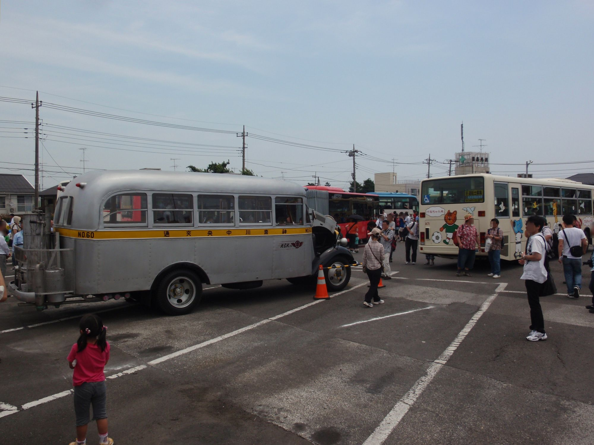 神奈川中央交通創立90周年を記念して厚木営業所で行なわれた感謝会。薪バス「三太号」、連節バス「ツインライナー」、ギャラリーバス「かなちゃん号」などが展示された。